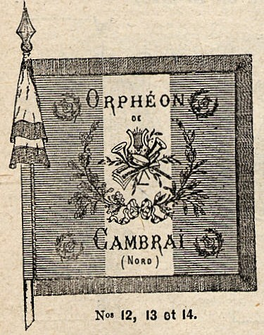 Drapeau de l'Orphéon de Cambrai (France).